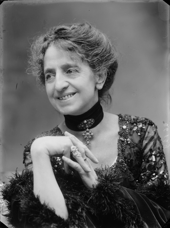 Sofia Bisi Albini fotografata da Mario Nunes Vais